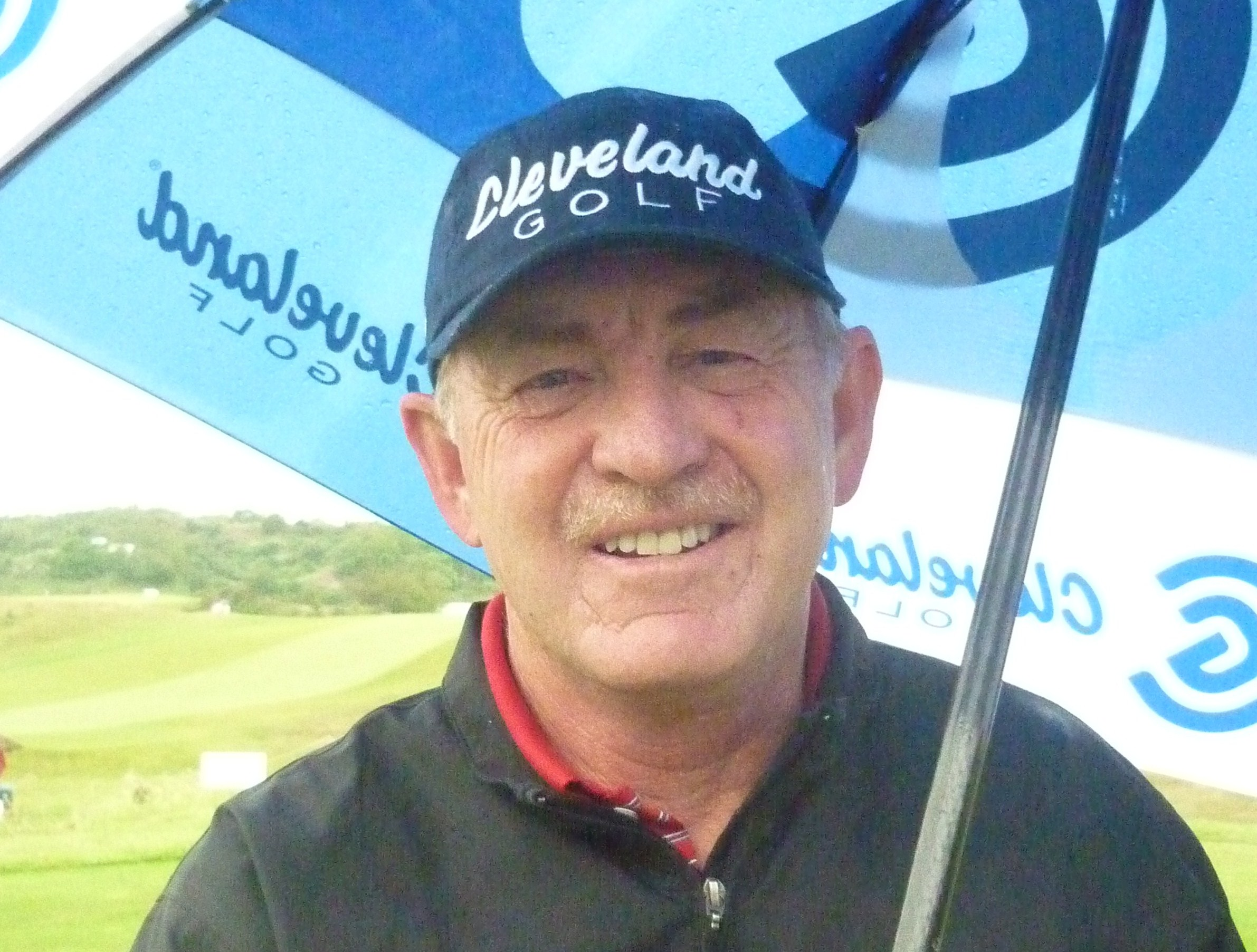 Tony Johnstone op het Van Lanschot Senior Open